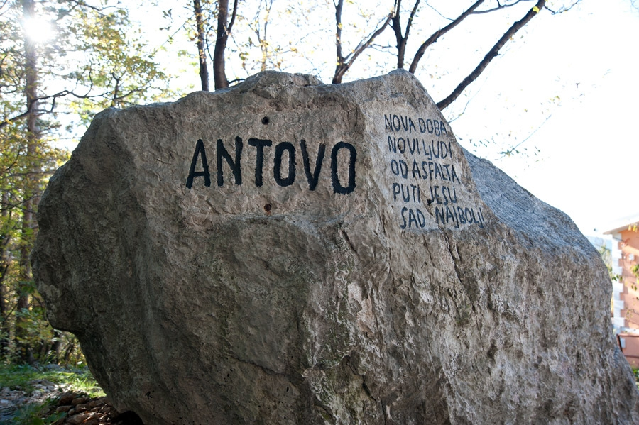 Stijena u Antovu pokraj Grižana na koju su mještani upisali neki povijesne događaje